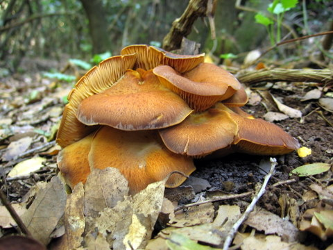 טבורית הזית, פטריה רעילה.Omphalotus olearius